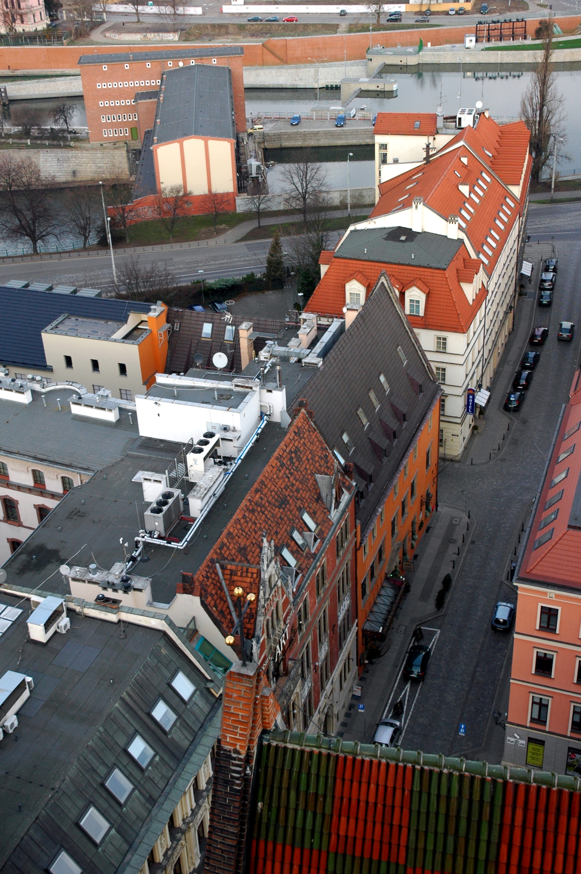 Wrocław w 2015 roku